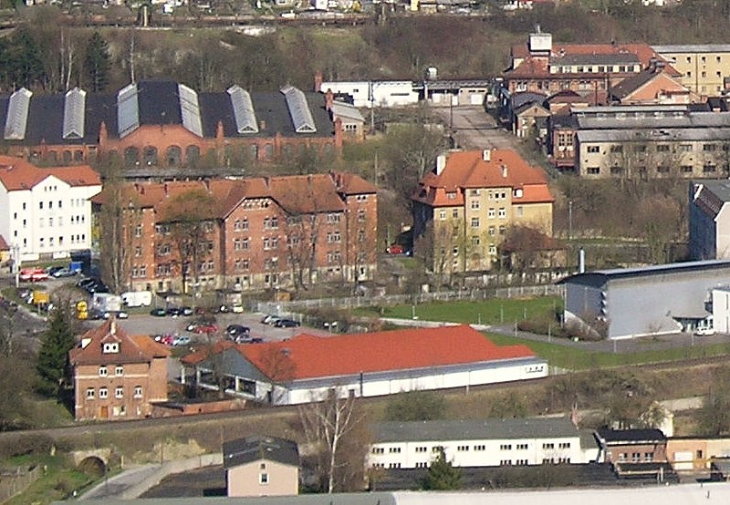 Gebäude der ehemaligen Nordkaserne in Meiningen, Bildmitte hinten: rotes und gelbes Gebäude 2007 abgerissen, seitdem Netto-Markt; vorn Lidl, rechts Telekom, rotes Gebäude links 2012 abgerissen und seitdem Elektronikmarkt